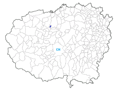 Posizione del comune nella provincia di Cuneo